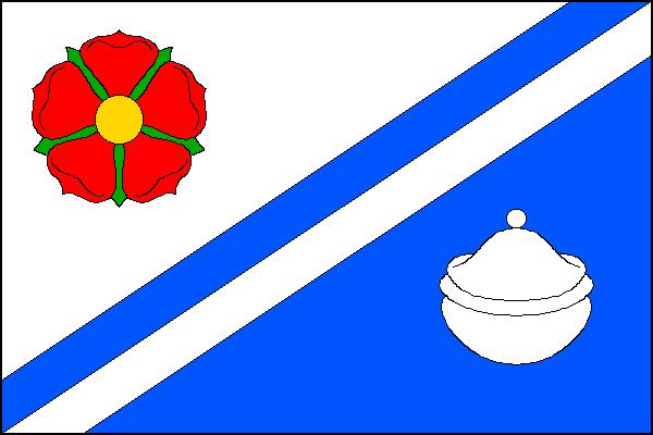 Vlajka obce Majdalena